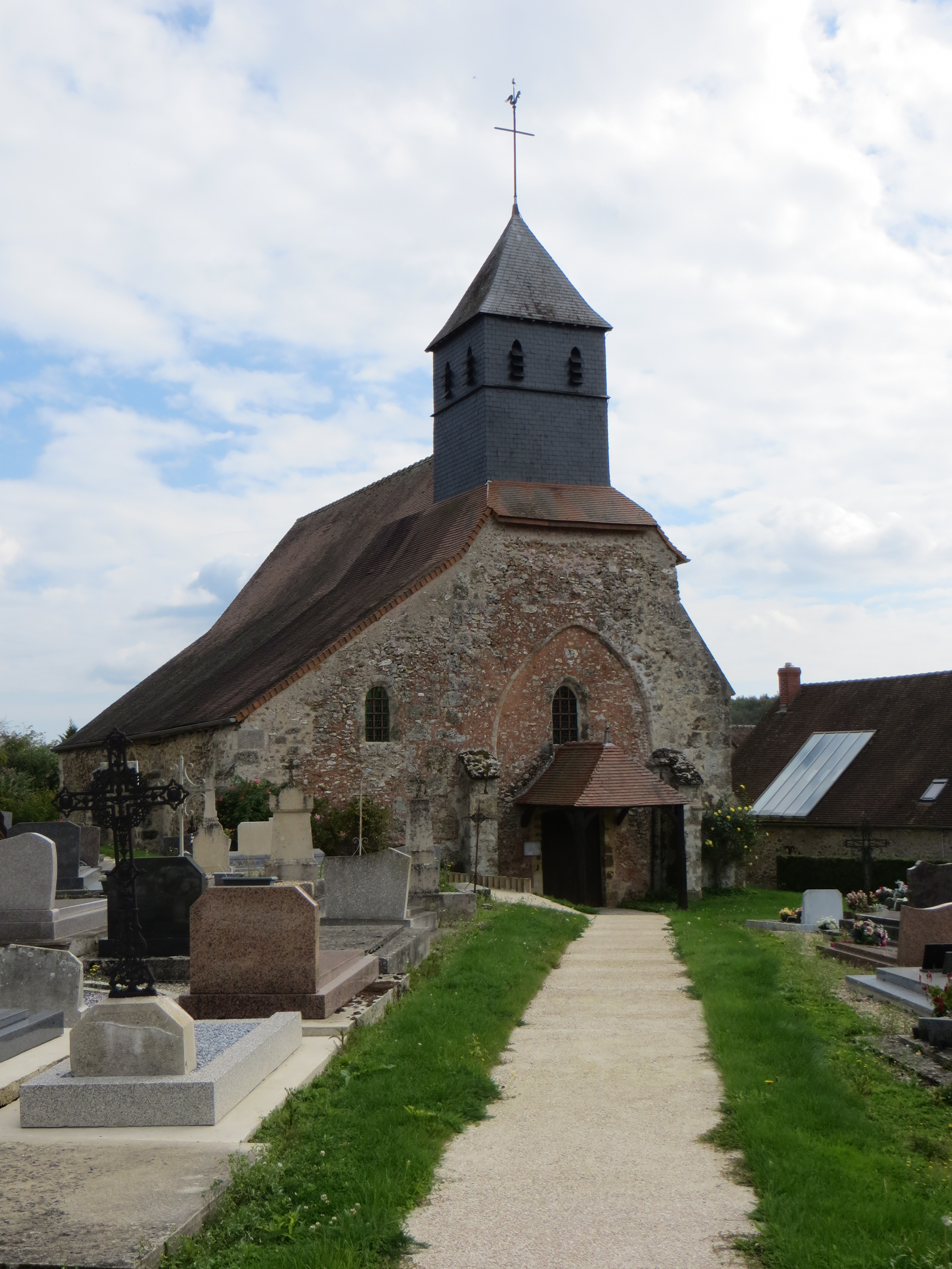 Vue générale de l'église